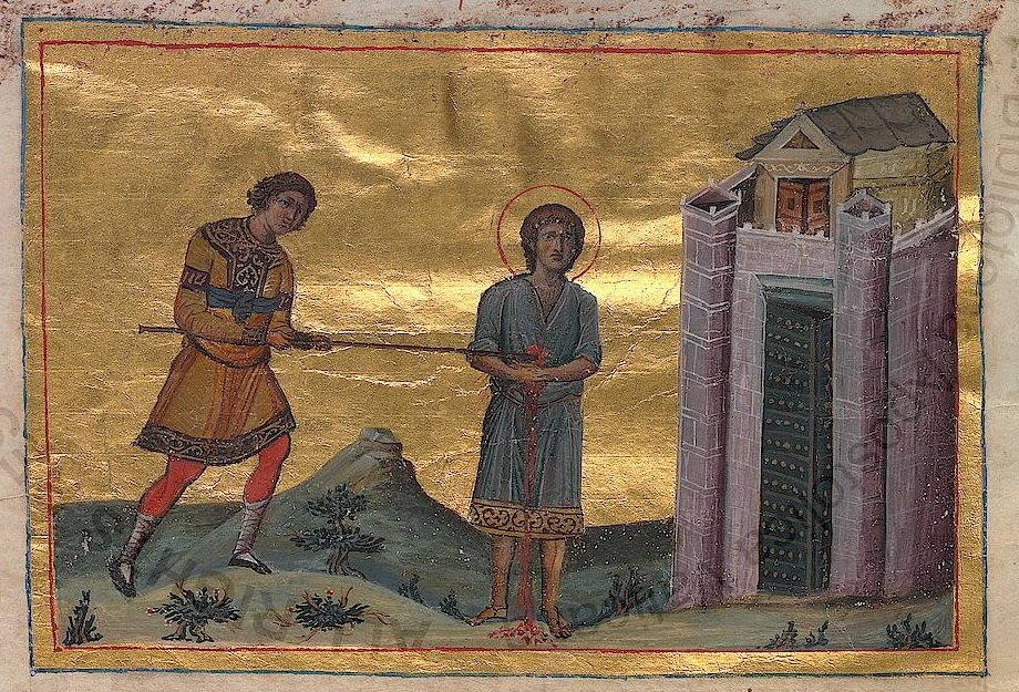 Святой мученик Мамaнт. Константинополь. 985 г. Миниатюра Минология Василия II. Ватиканская библиотека. Рим.